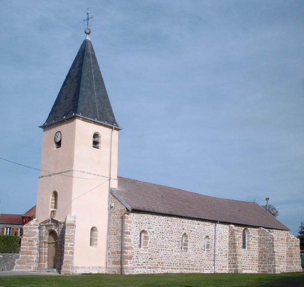 église de Soyers (Haute-Marne)